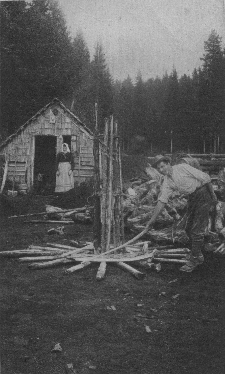 Legen der sog. Bruck